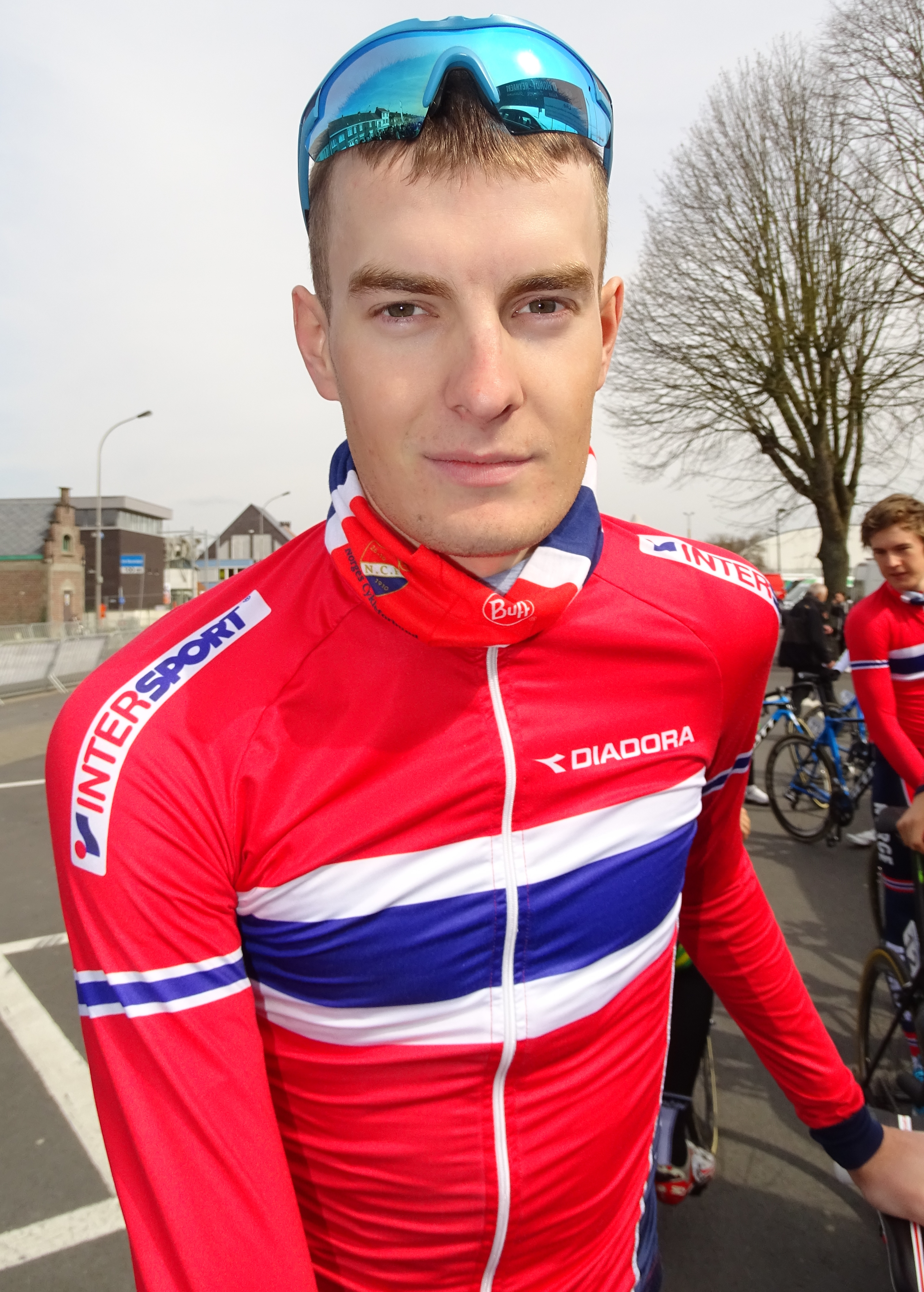 Reportage réalisé le samedi 9 avril à l'occasion du départ et de l'arrivée du Tour des Flandres espoirs 2016 à Audenarde, Belgique.